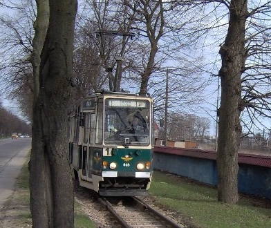 Tramwaj 805Na na alei Grunwaldzkiej w Elblągu. Tram 805Na on Grunwaldzka Avenue in Elbląg, Poland.